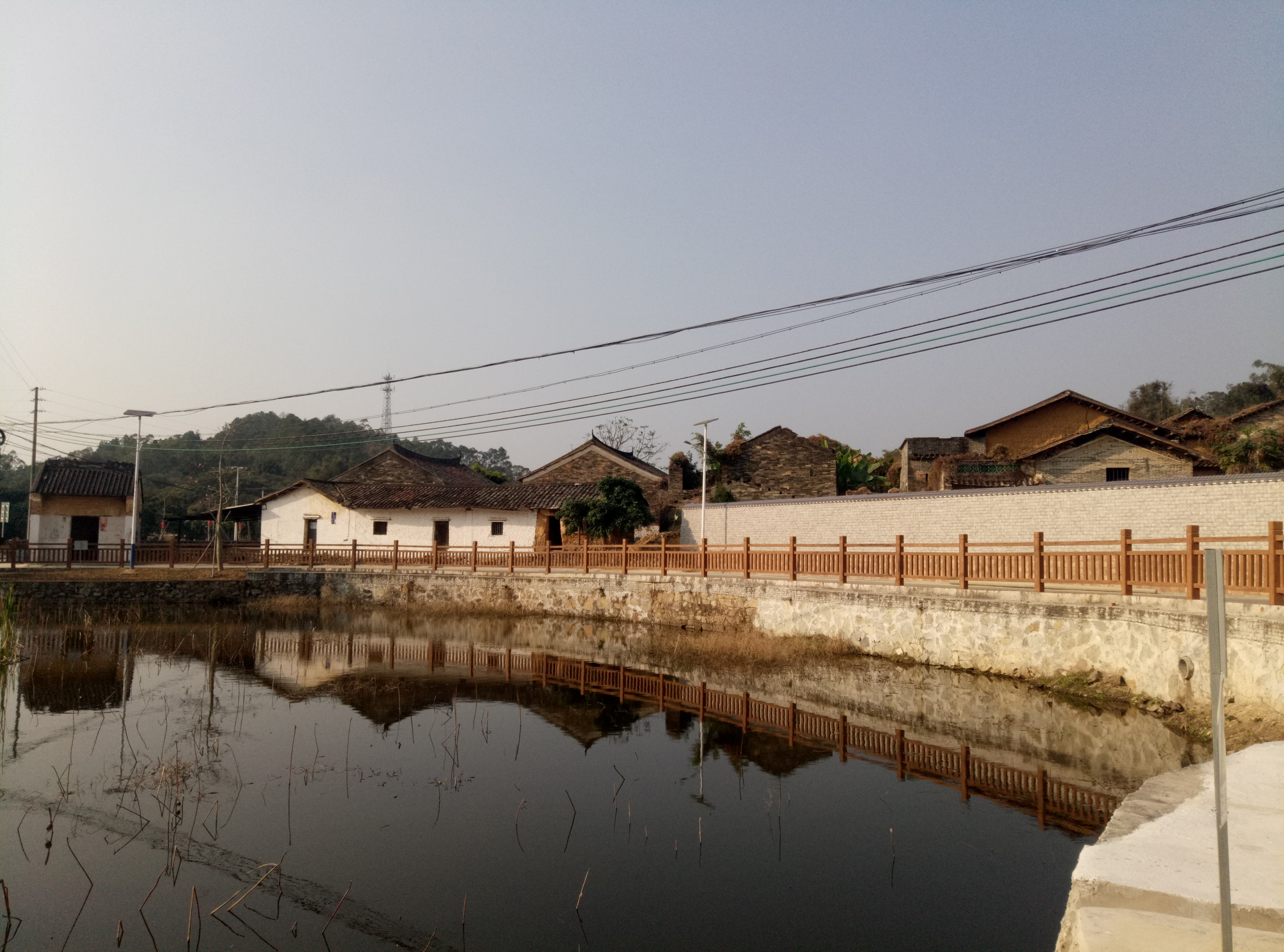 秋楓峒村，世居鍾氏，在廣東從化縣馬村堡。